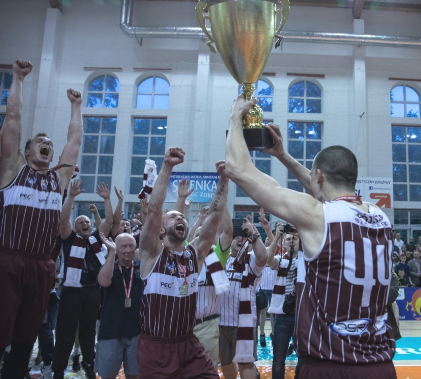 Puchar dla Spójni Stargard (17.05.2018)